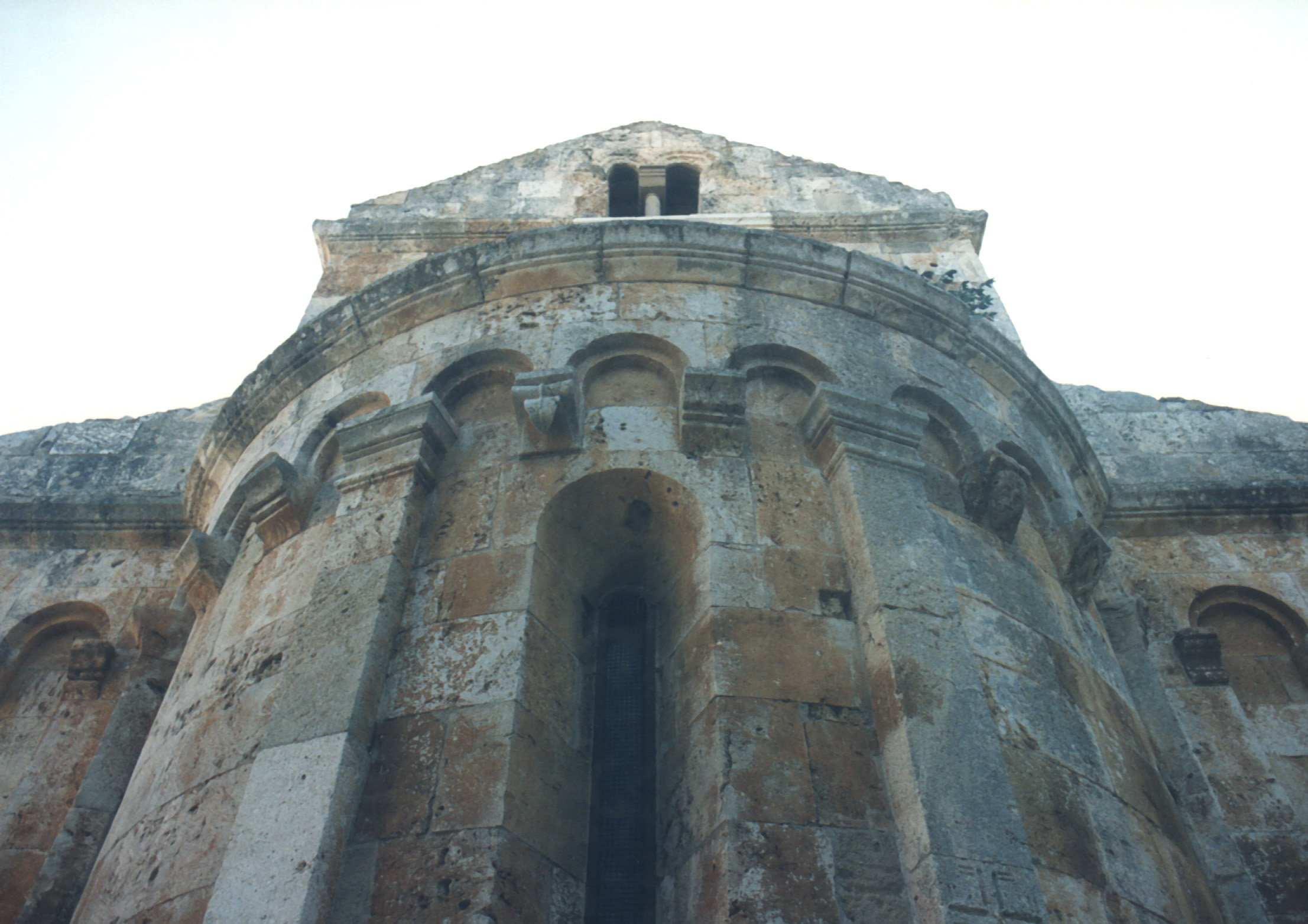 Chiesa di Santa Maria (XII secolo), Uta (CA), Sardegna